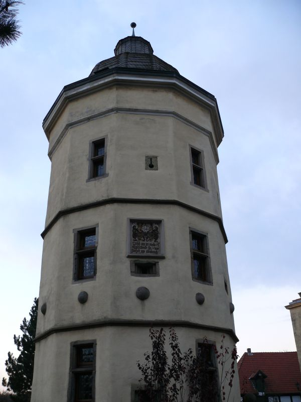 Haus Reck, Hamm